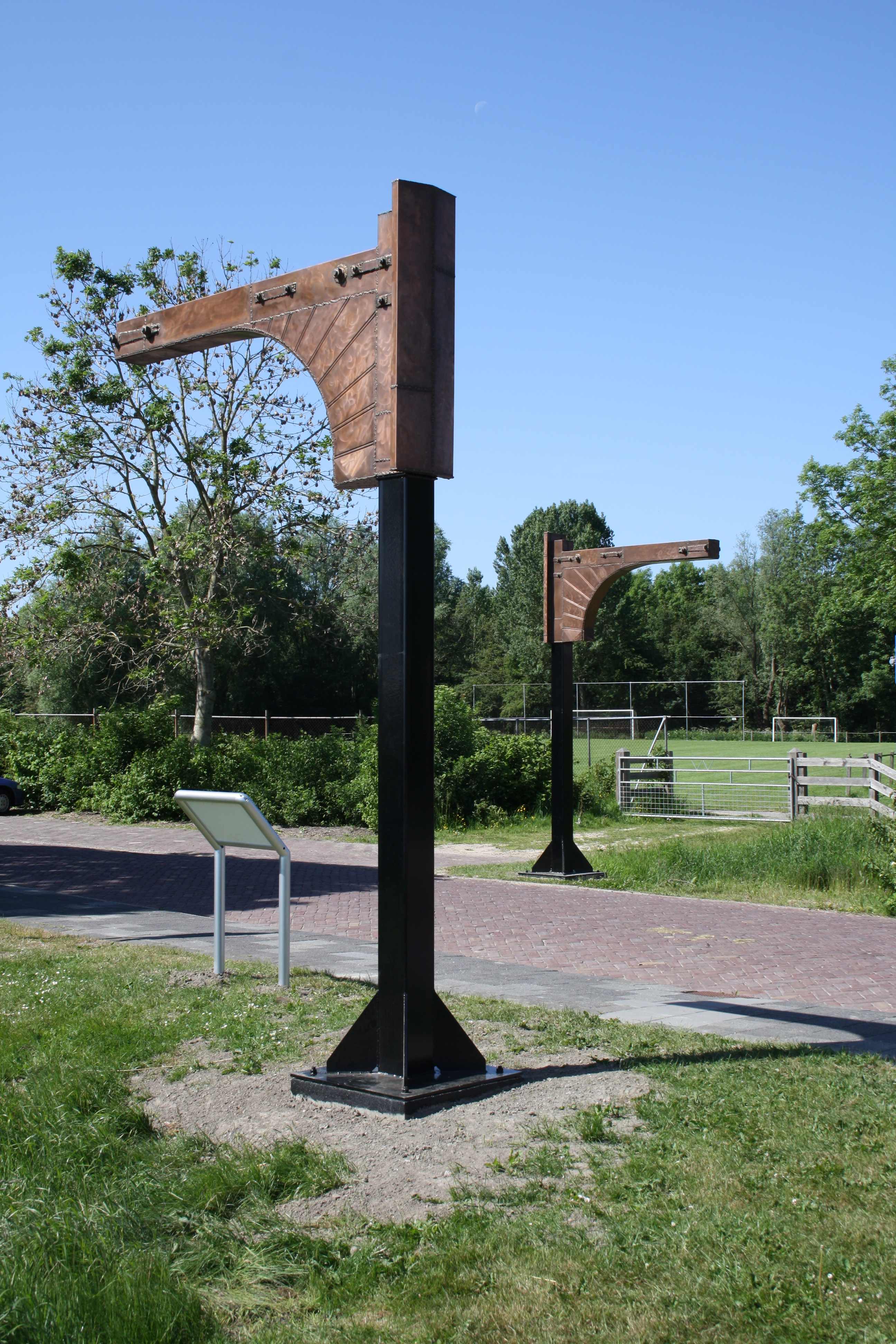 Jan Hulsebos